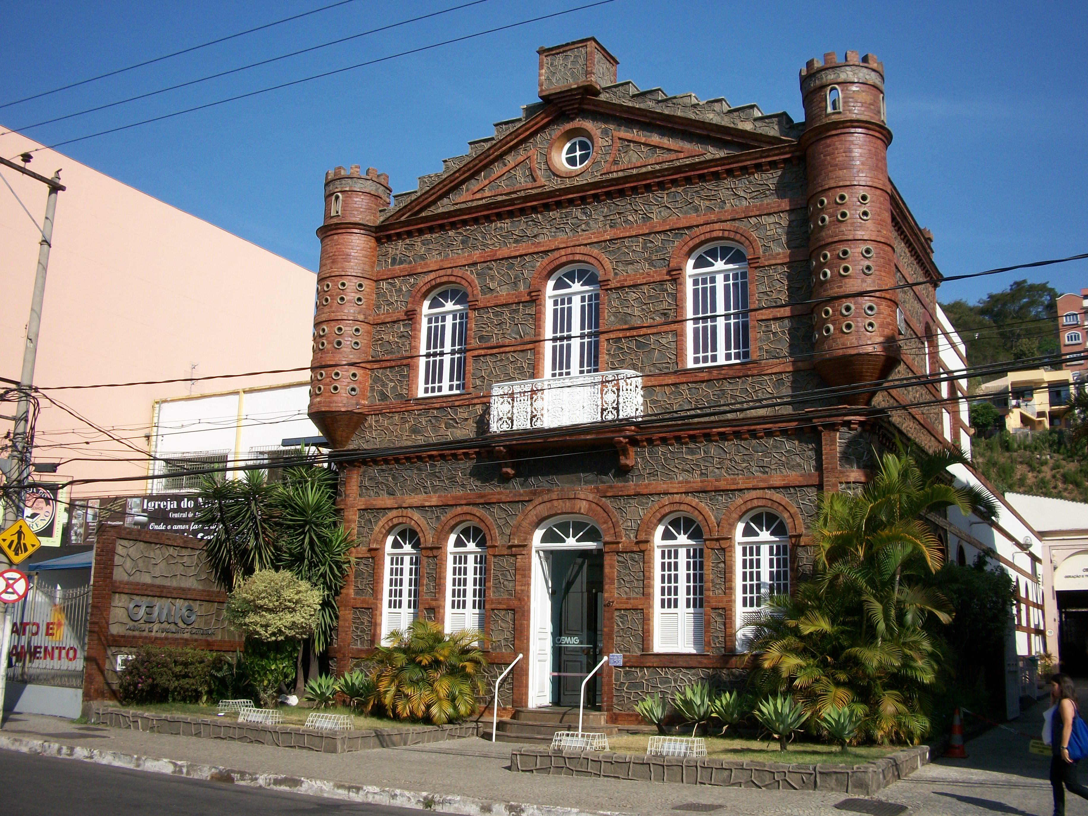 Prédio conhecido como Castelinho da Cemig, em Juiz de Fora.